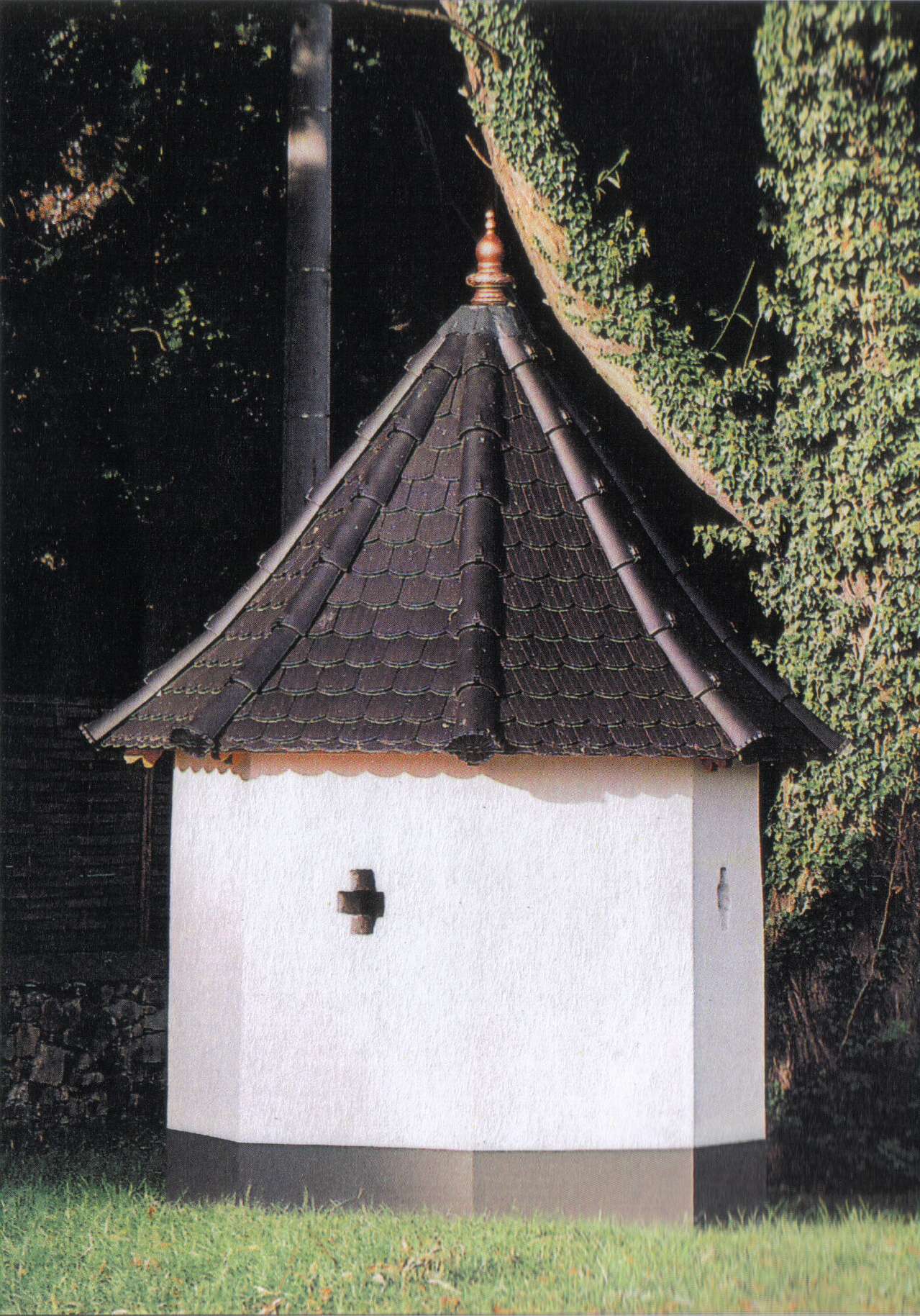 Bildbeschreibung: Dorfbrunnen